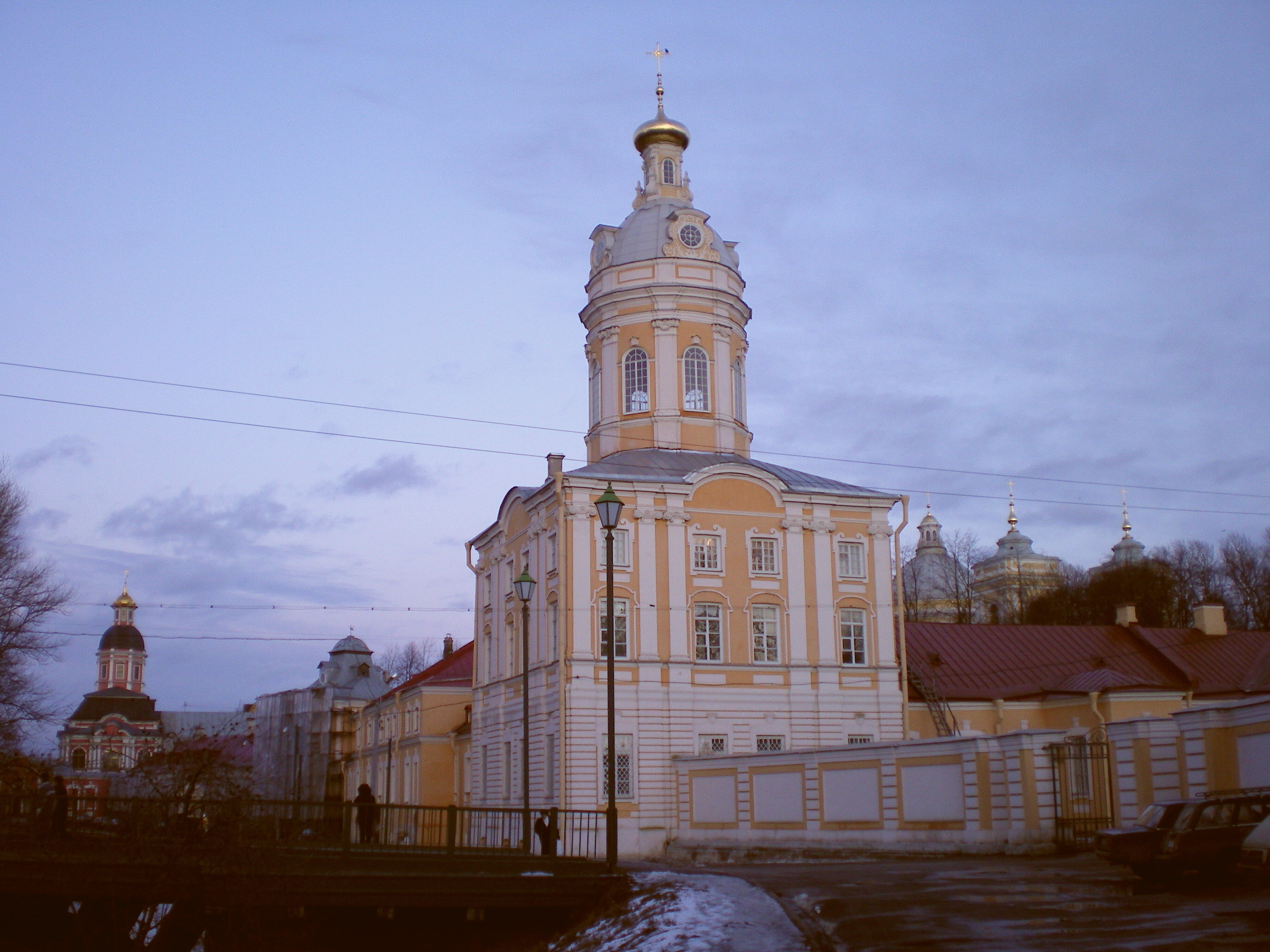 Александро-Невская Лавра на закате. На переднем плане - Северо-Западная башня (Ризница)